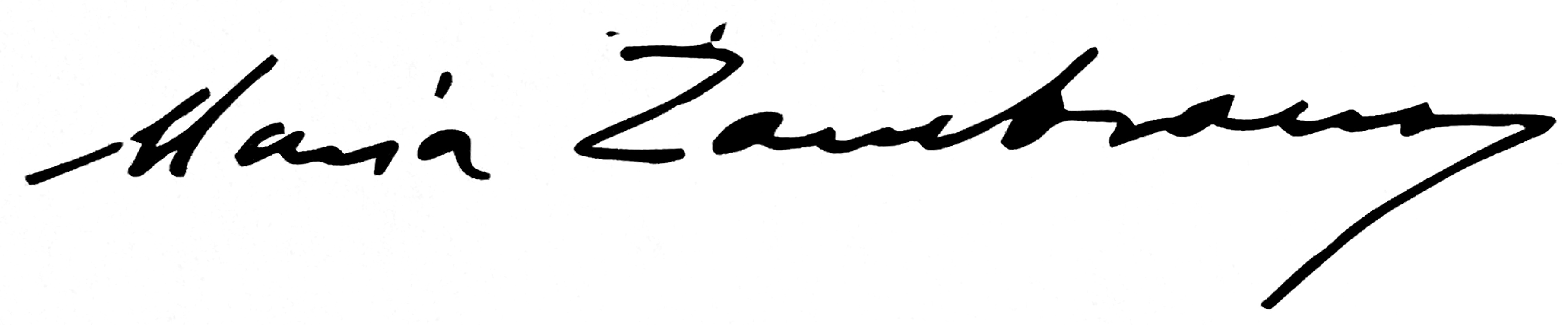 Firma o rubrica de María Zambrano Alarcón (Vélez-Málaga, Málaga, 22 de abril de 1904-Madrid, 6 de febrero de 1991)1​ pensadora, filósofa y ensayista andaluza